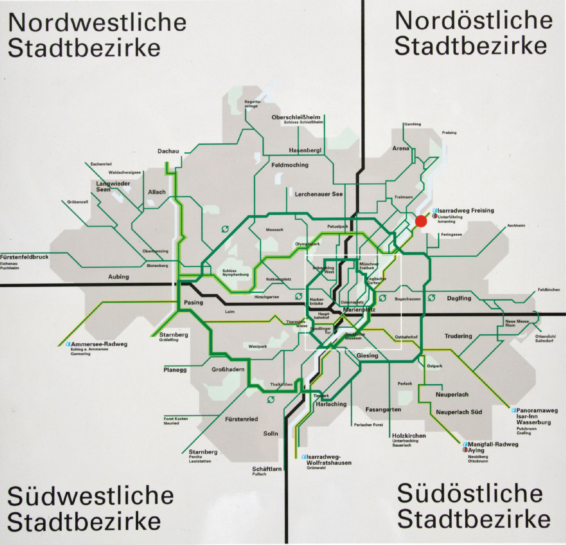 München, Überblick über das gesamte Fahrradnetz, Detail der Informationstafel nahe der Isarbrücke in der Mittleren Isarau